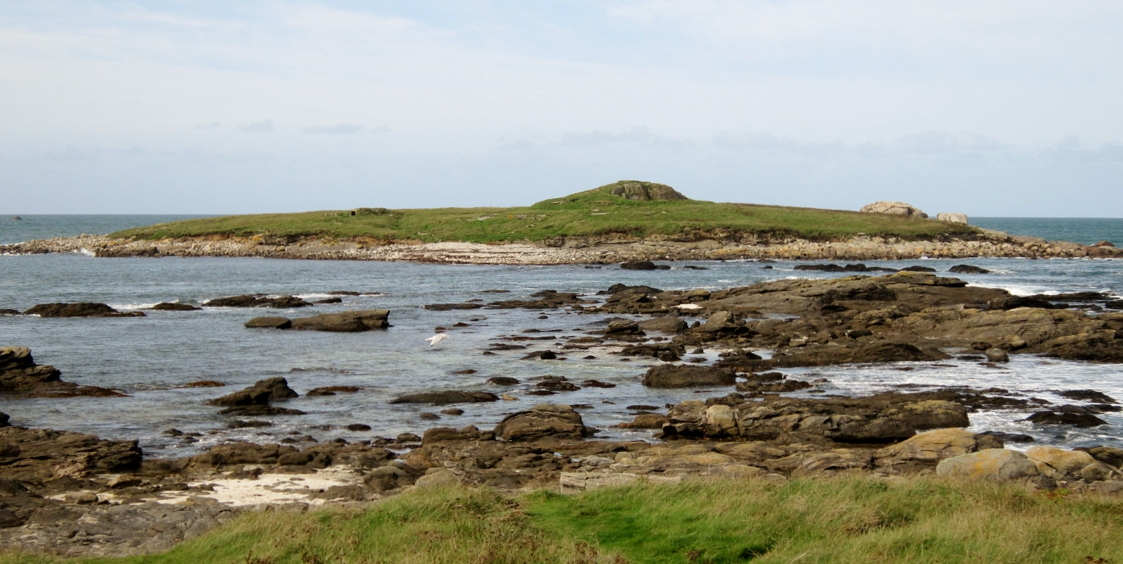 L'Île Carn vue du continent (le long du sentier littoral GR 34).